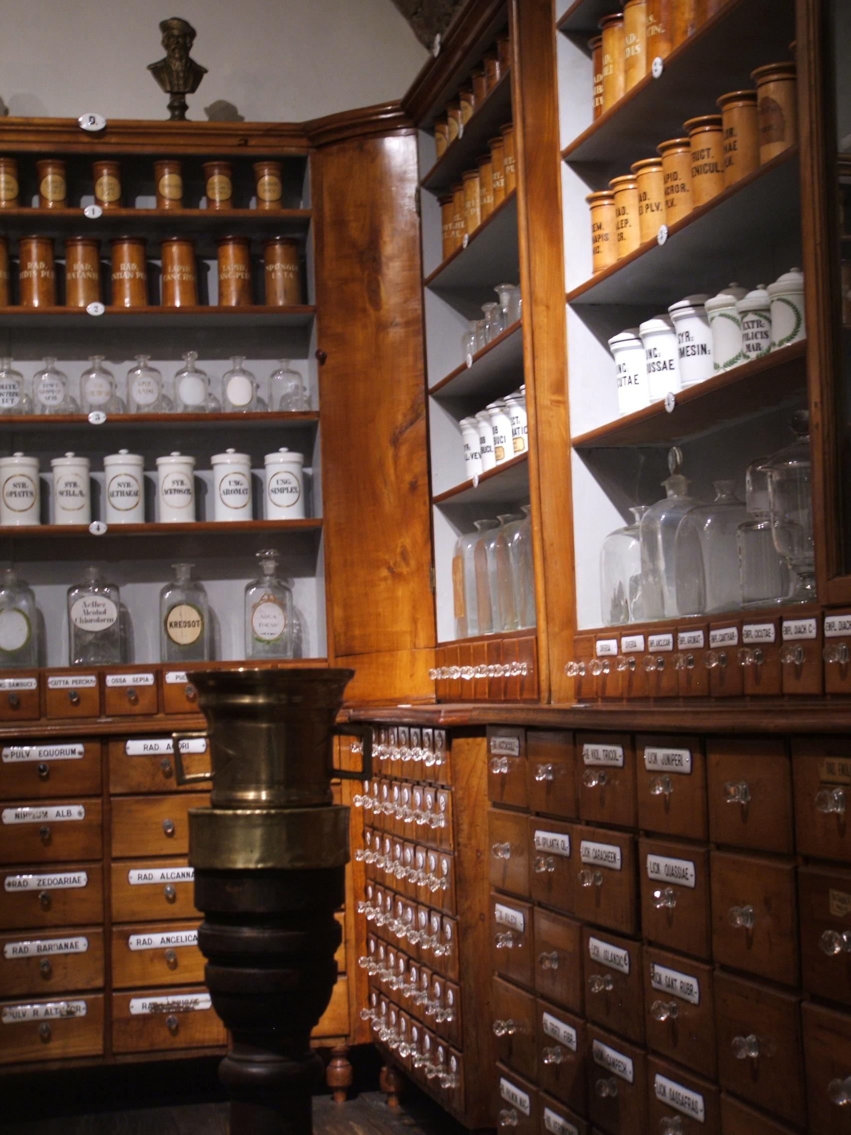 Maribor